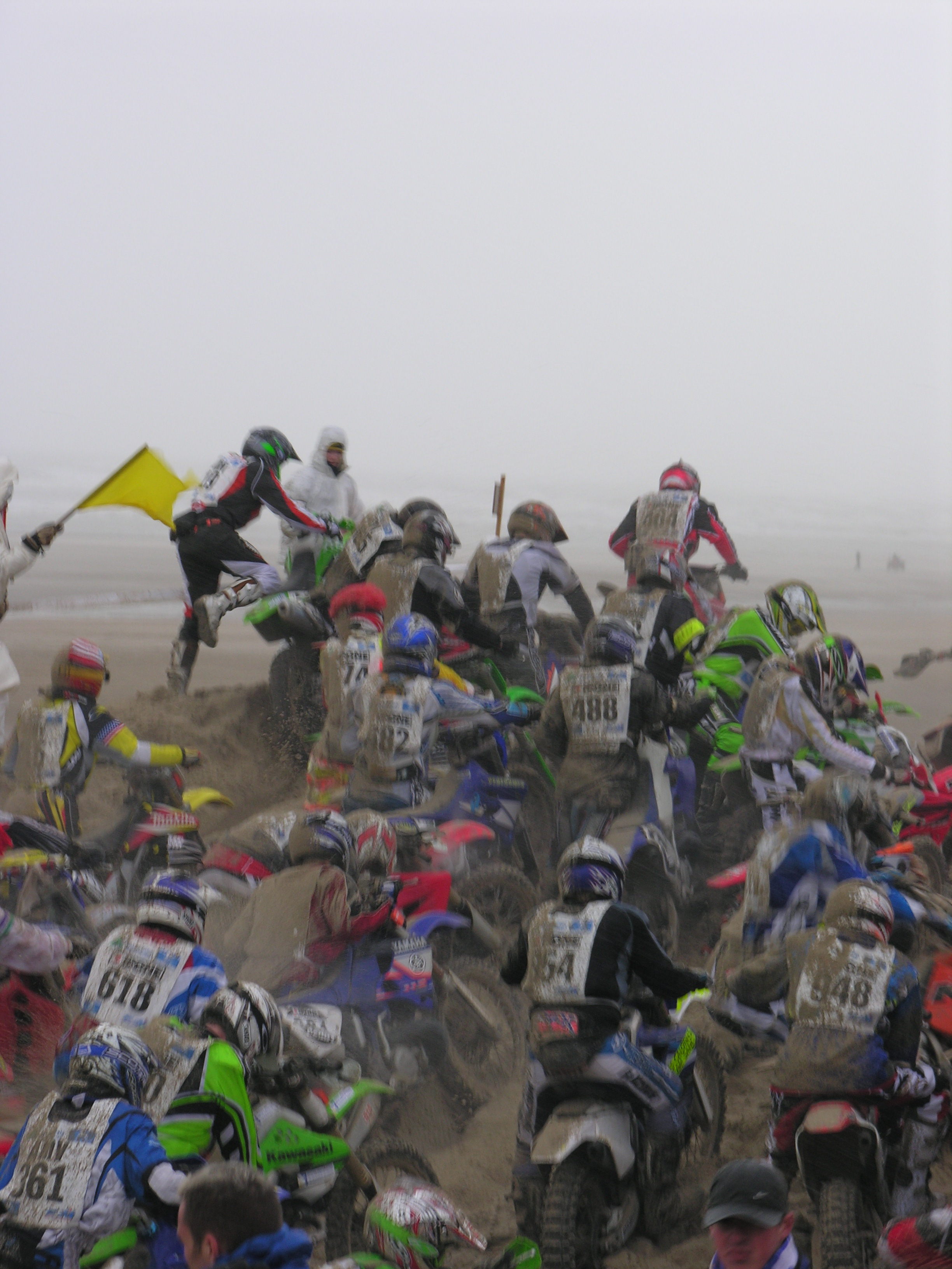 France, Pas-de-Calais, enduro des sables 2007